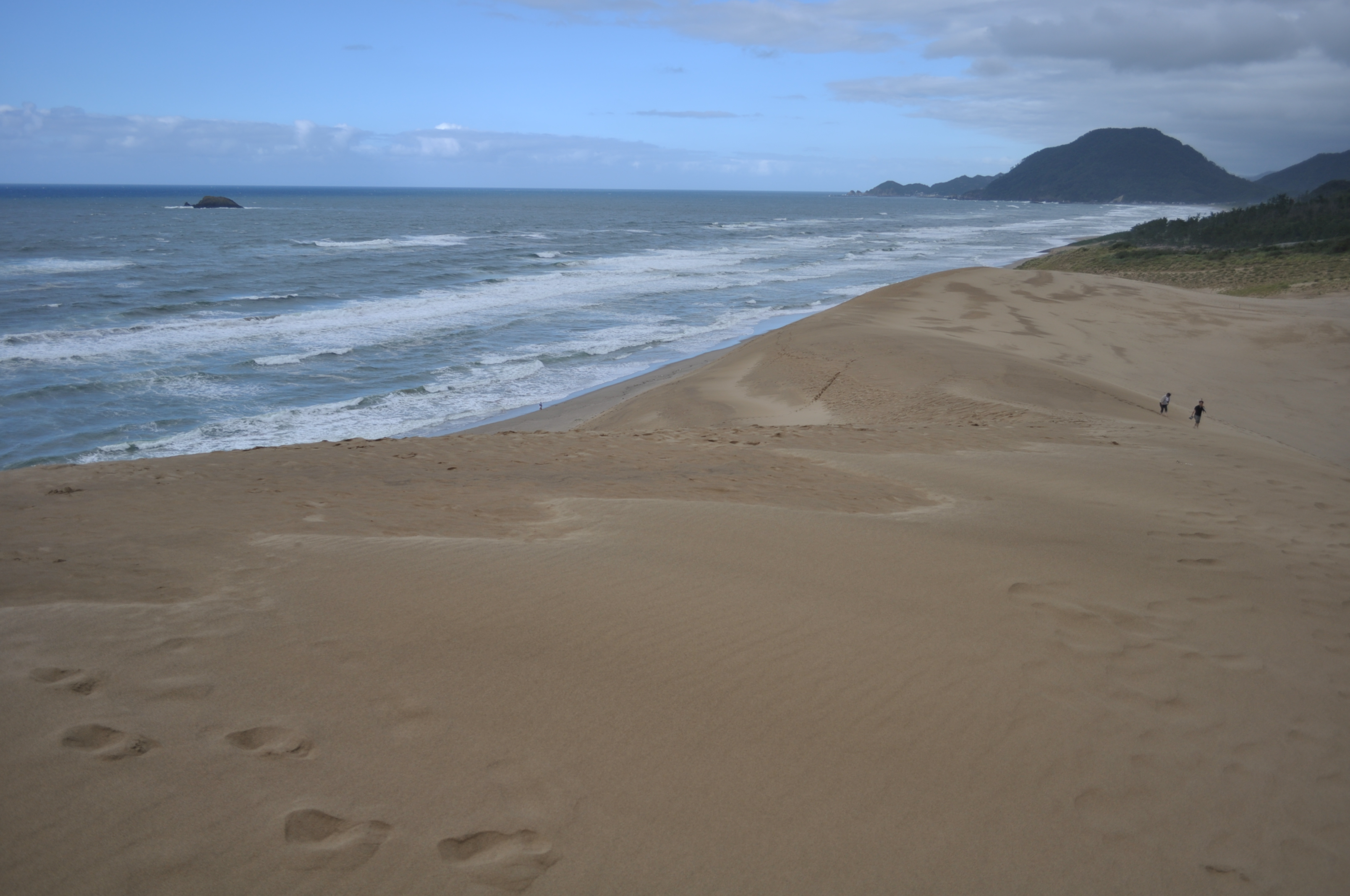 鳥取砂丘と海水浴場